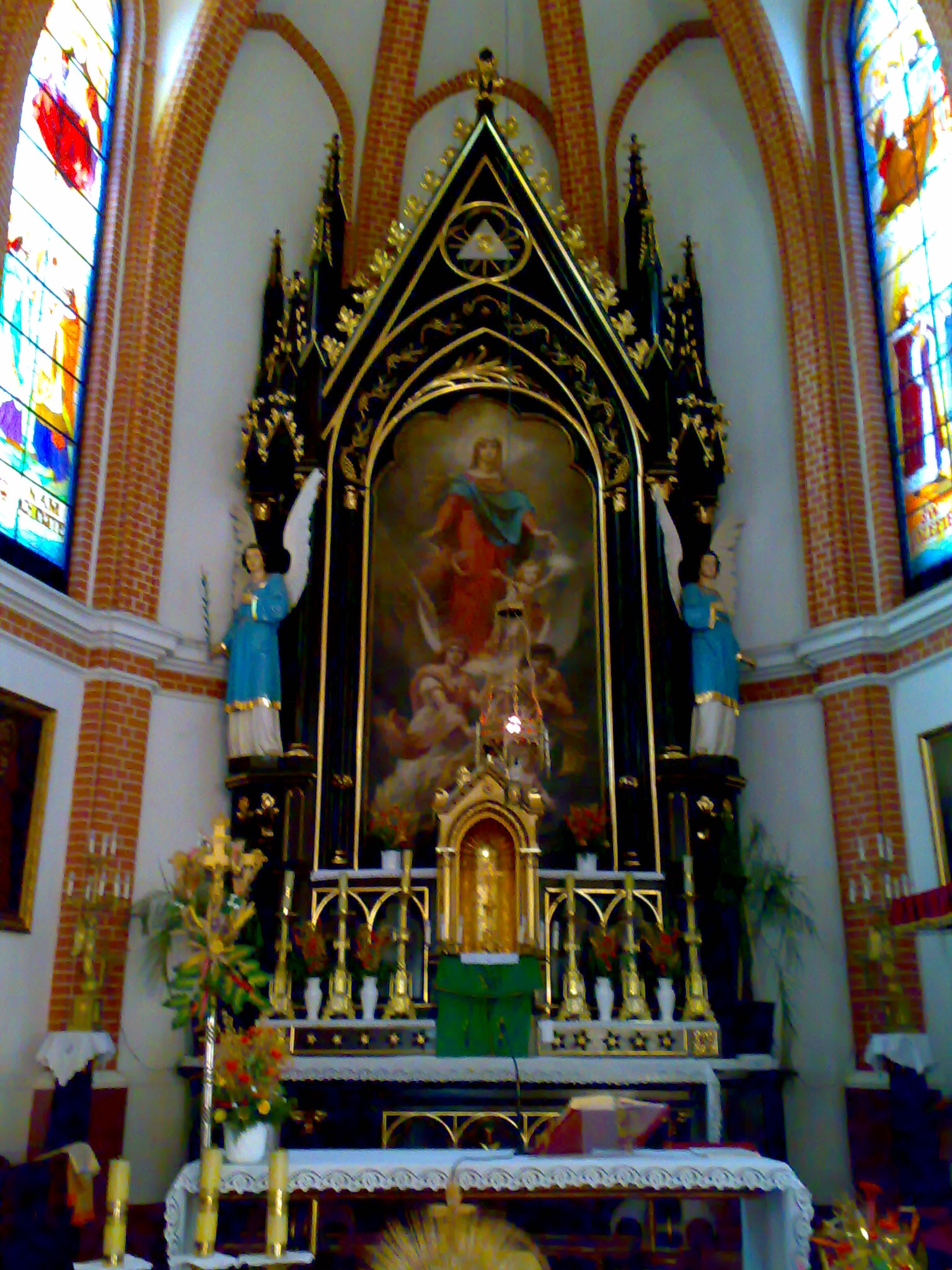 Ołtarz WNMP Michał Elwiro Androlii